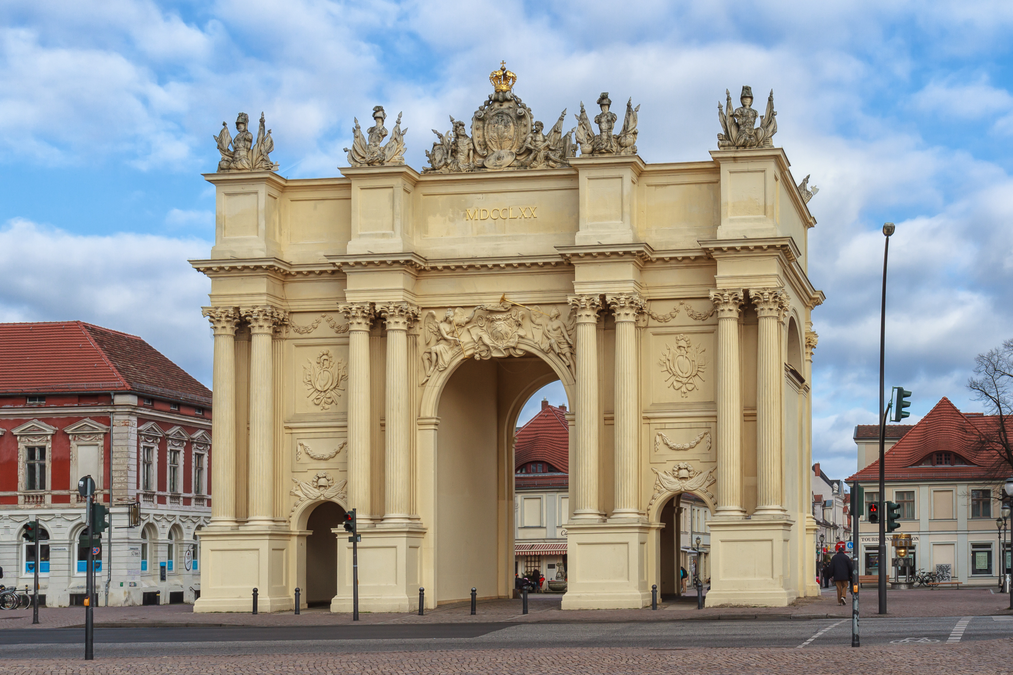 Potsdam - Brandenburger Tor - Feldseite - 2013